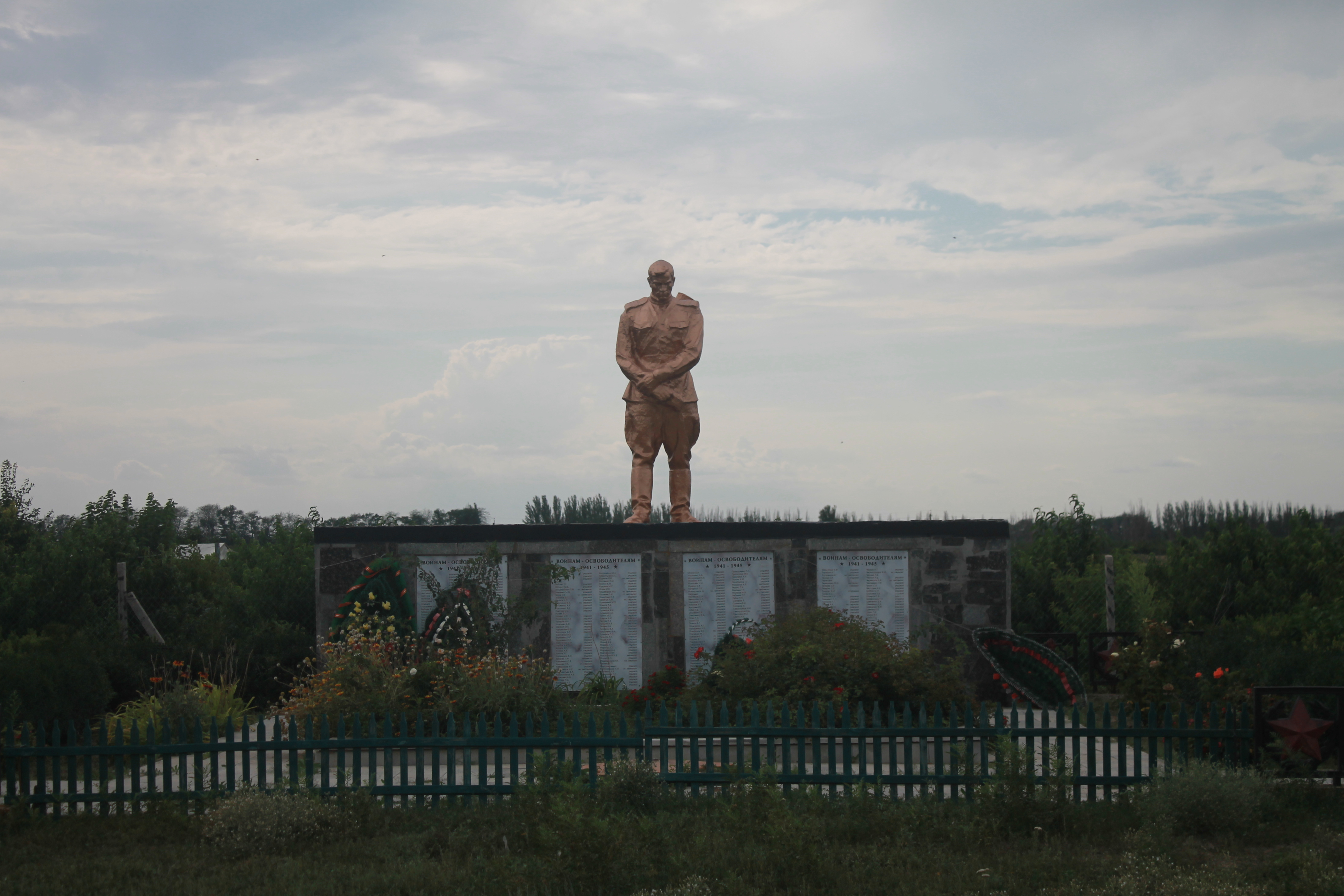 Пам'ятник воїнам-визволителям (Друга світова війна) в селі Кирпичне, Мелітопольський район.